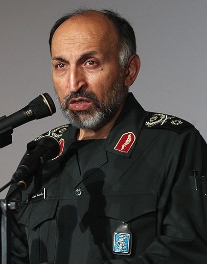 سردار سید محمد حجازی معاون آماد، ‌پشتیبانی و تحقیقات صنعتی ستاد کل نیروهای مسلح در جشنواره علوم پزشکی سپاه پاسداران انقلاب اسلامی